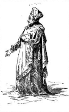 Antoine de Mailly Membre du Conseil des Anciens (1795-1798)